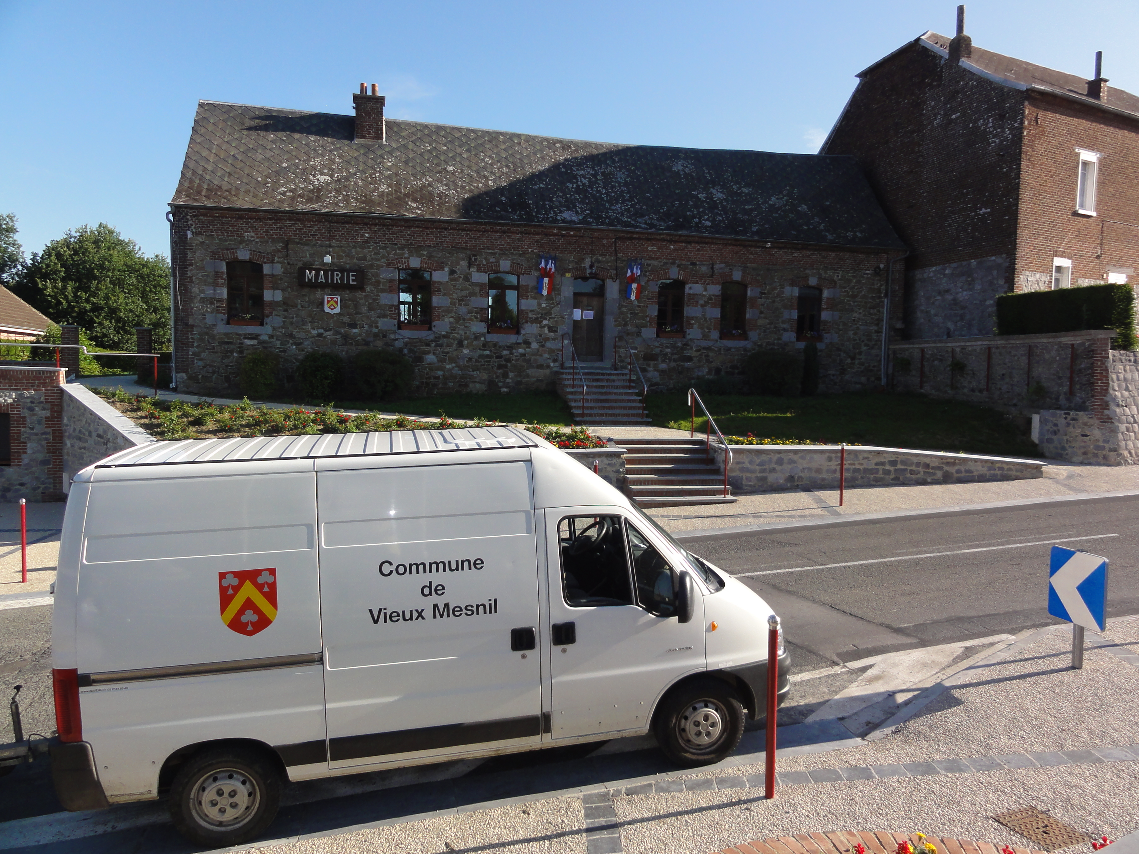 Vieux-Mesnil (Nord, Fr) mairie